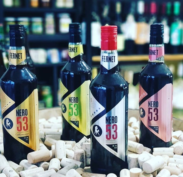 Fernet Nero 53 Artesanal. EL premium y los Saborizados